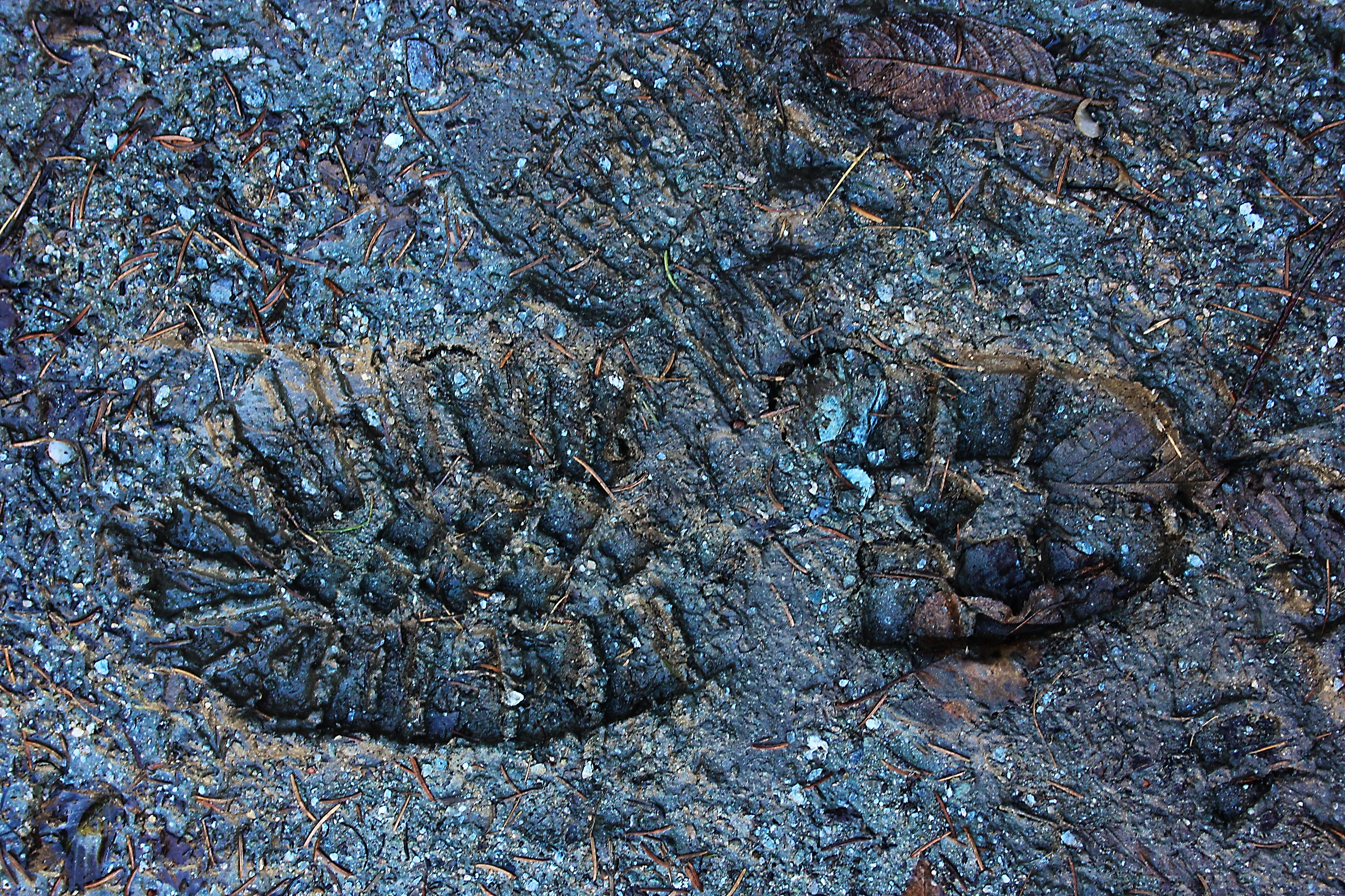 Schuheindruckspur auf weichem Boden